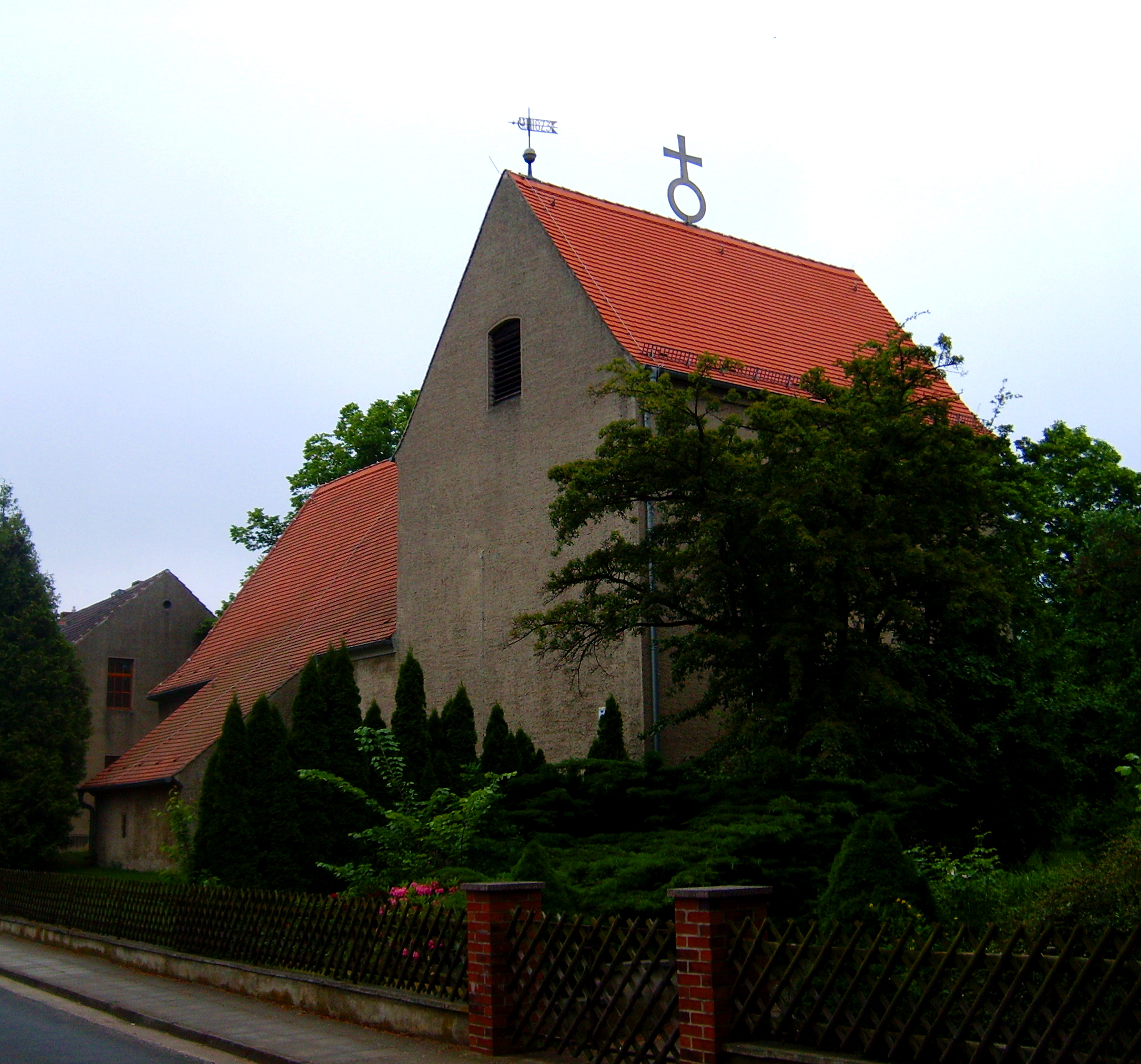 Dorfkirche Würdenhain, Deutschland.